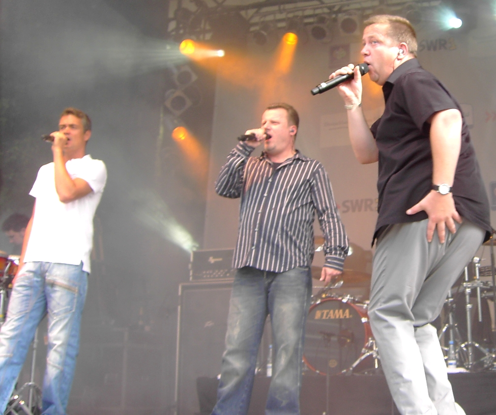 Drei der Prinzen bei einem Konzert in Biberach/Riss am 20. Juni 2006. Zur Verfügung gestellt von weberberg.de, der Website für Biberach.